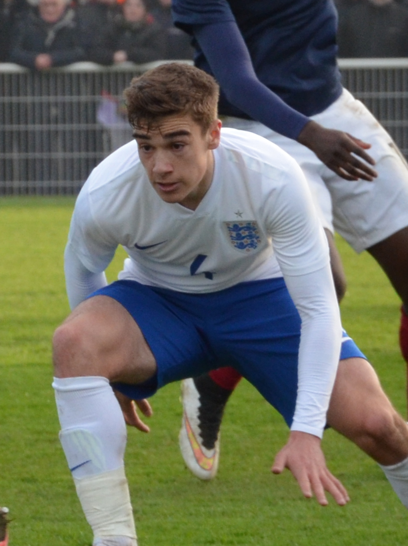 Photographie prise lors du match opposant la France à l'Angleterre pour les qualifications du championnat d'Europe de football des moins de 19 ans 2015 au stade Louis-Villemer de Saint-Lô le 31 mars 2015. Ici, Harry Winks.